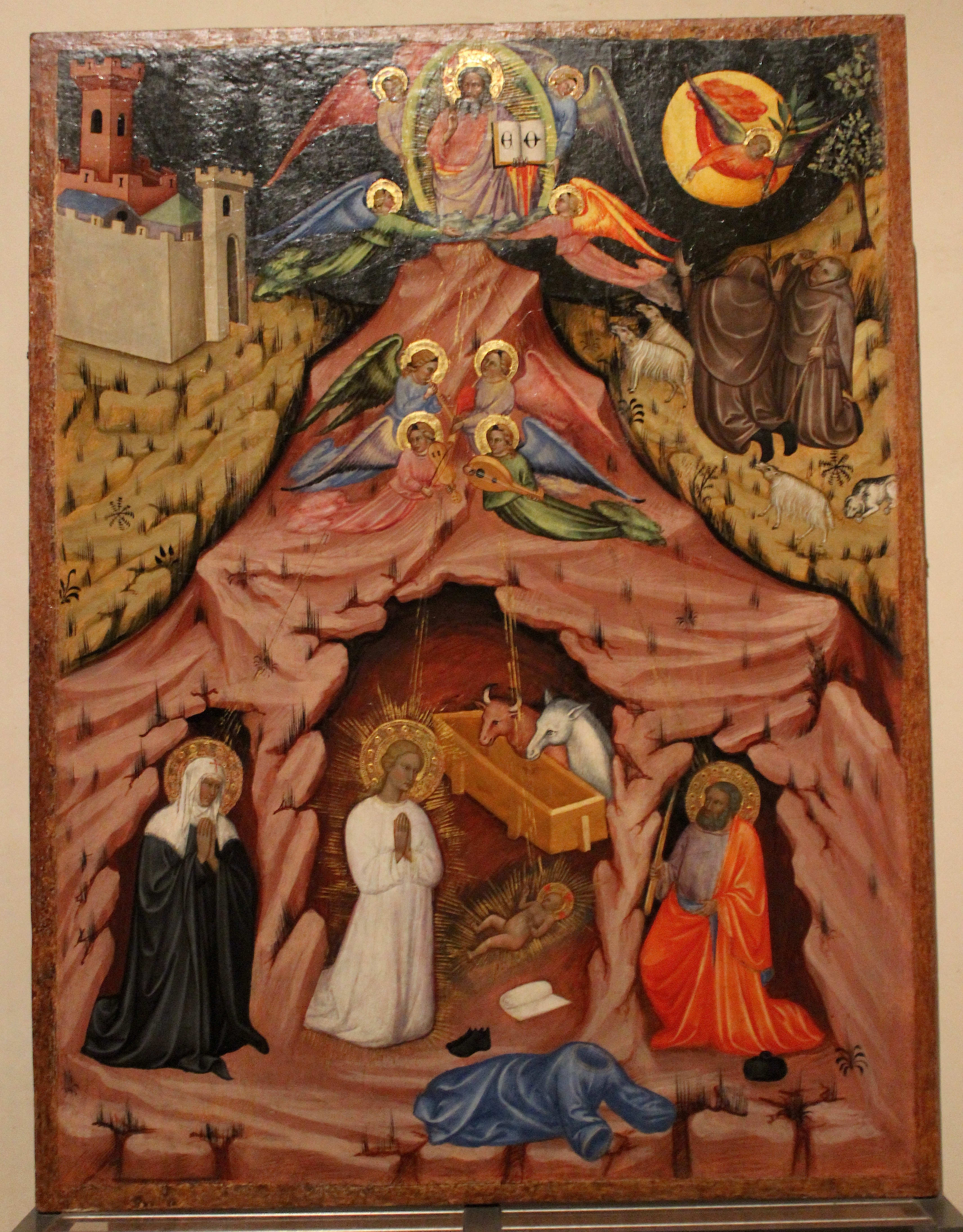 Turino Vanni, Natividad. Pisa, Museo di San Matteo.